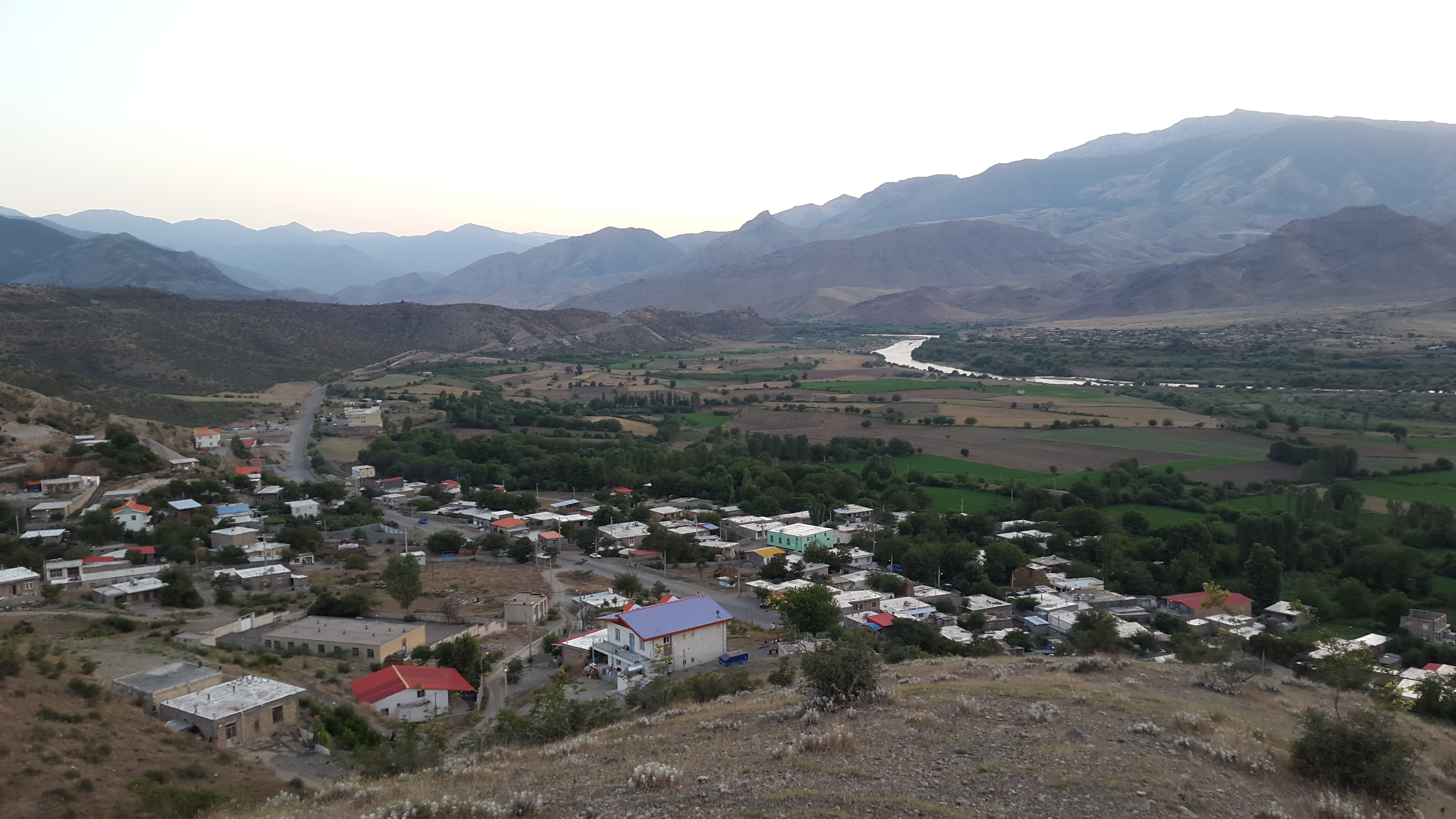 ibrahimsəmi